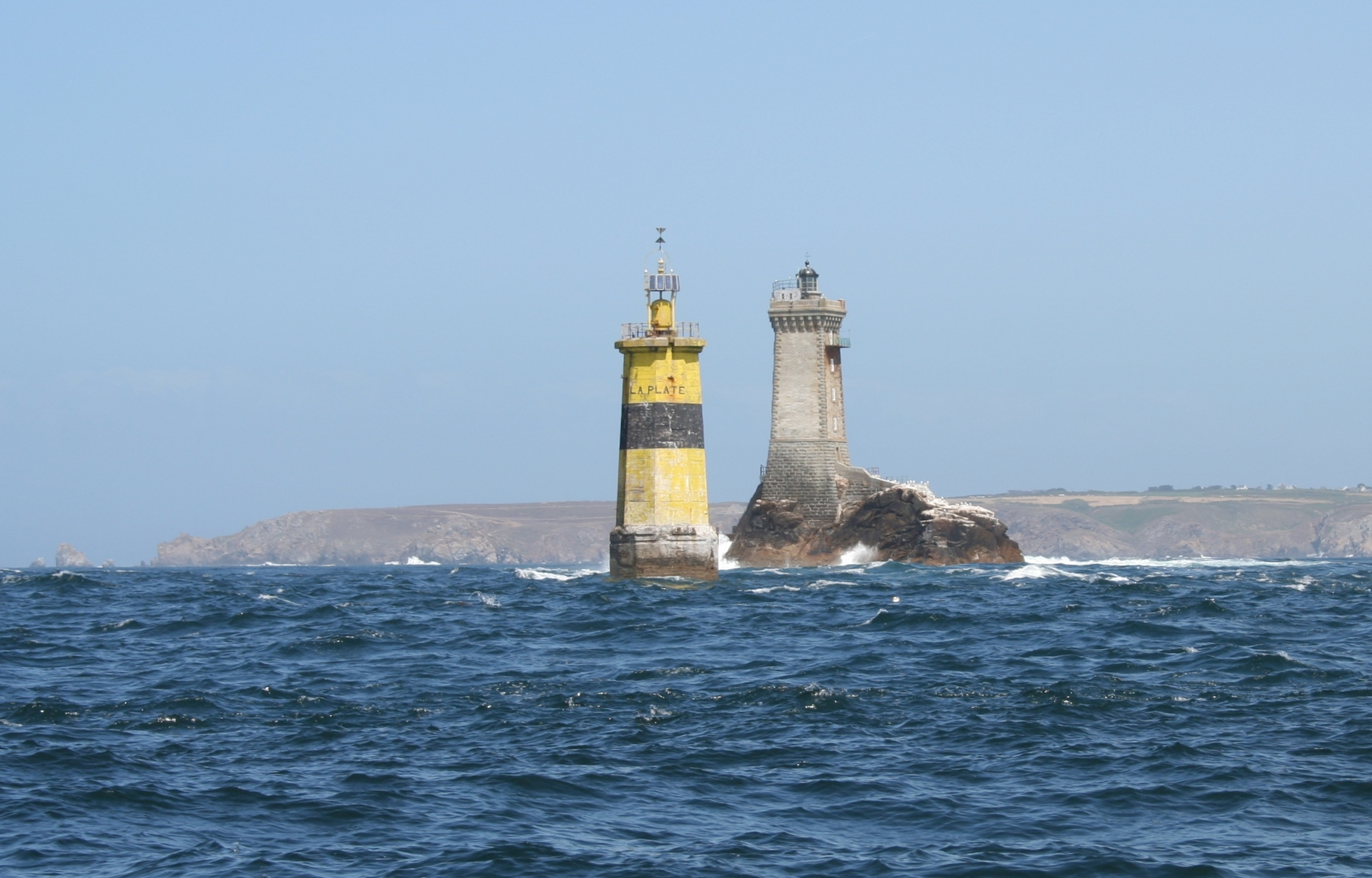 La tourelle de la Plate devant le phare de Vieille, dans le Raz de Sein